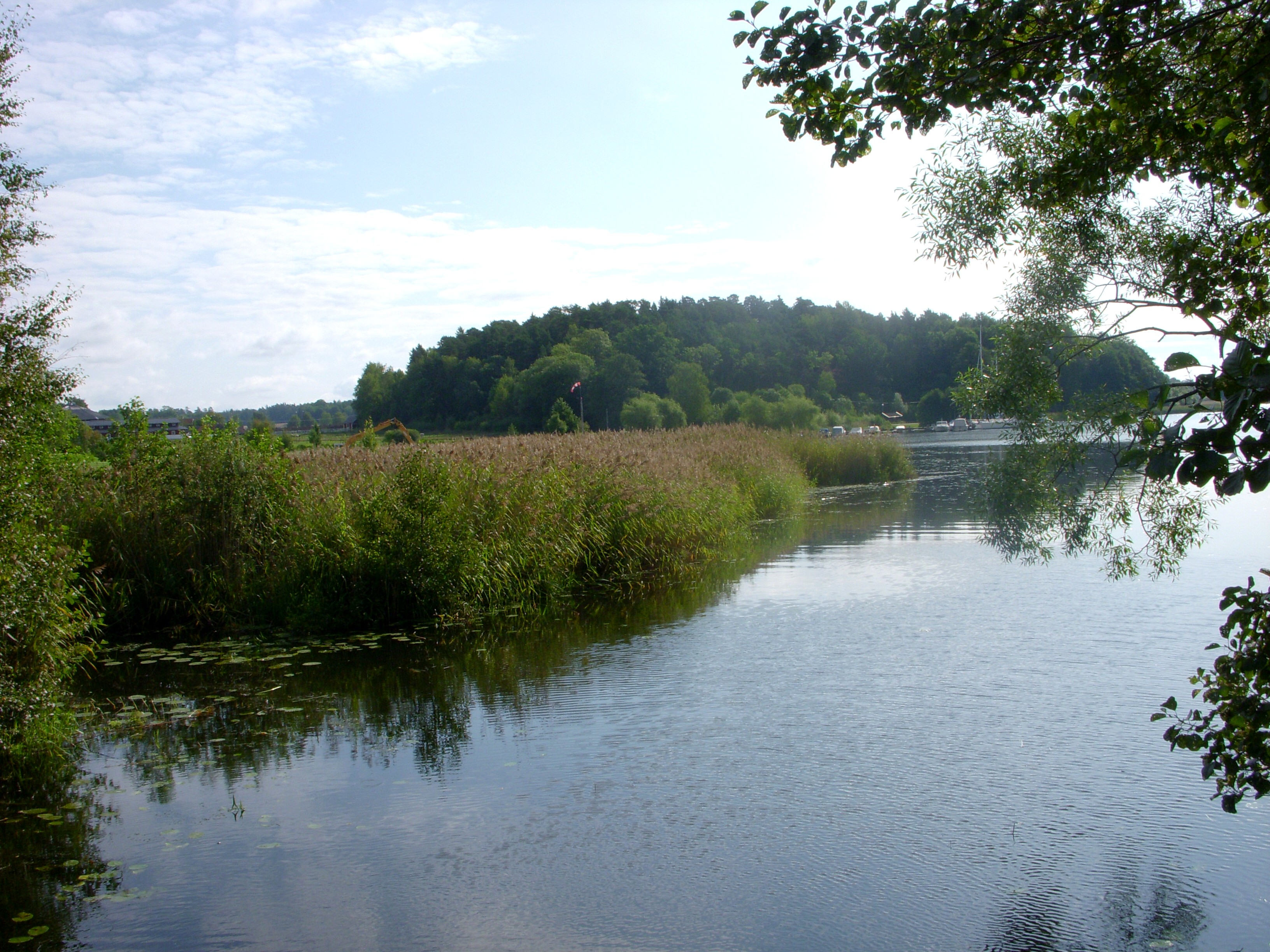 "Helgö kanal" mot öst, Helgö, Ekerö kommun